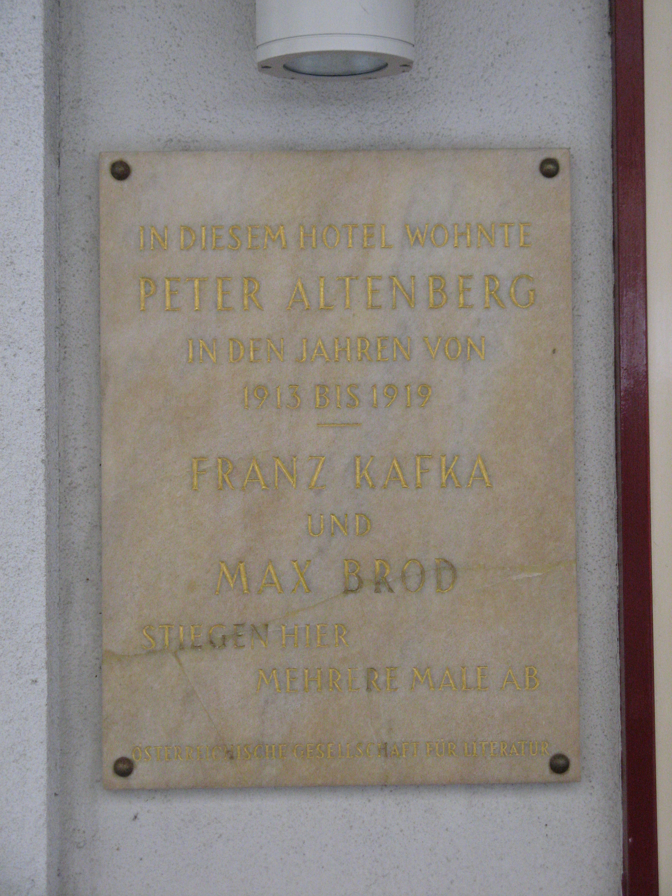 Gedenktafel für Peter Altenberg, Franz Kafka und Max Brod, Grabenhotel, Dorotheergasse 3, Wien-Innere Stadt